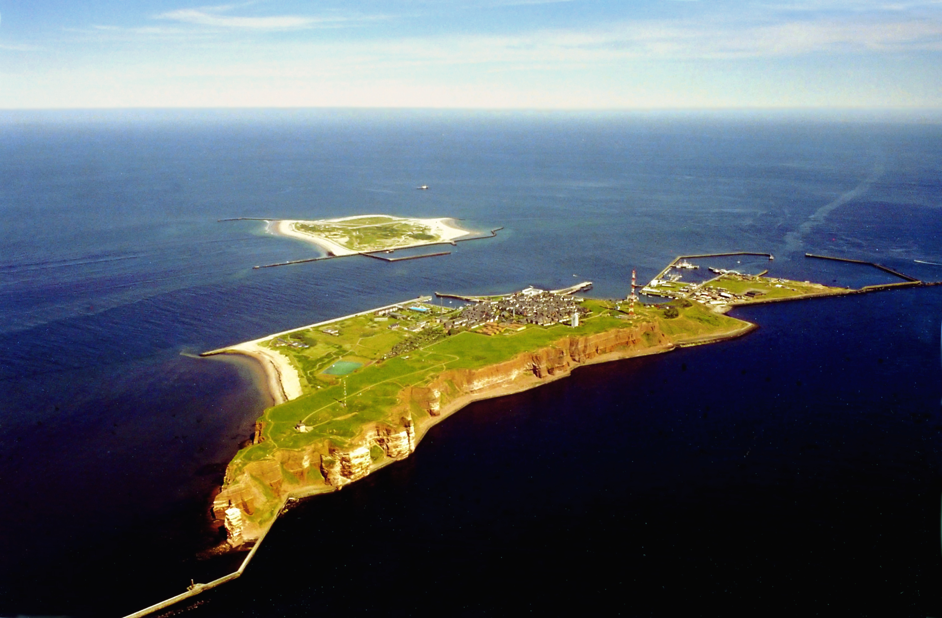 Helgoland in der Vogelperspektive (Helgoland im Vordergrund, im Hintergrund die Düne)